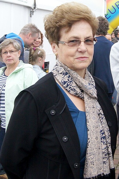 Danuta Wałęsa, żona Lecha Wałęsy.